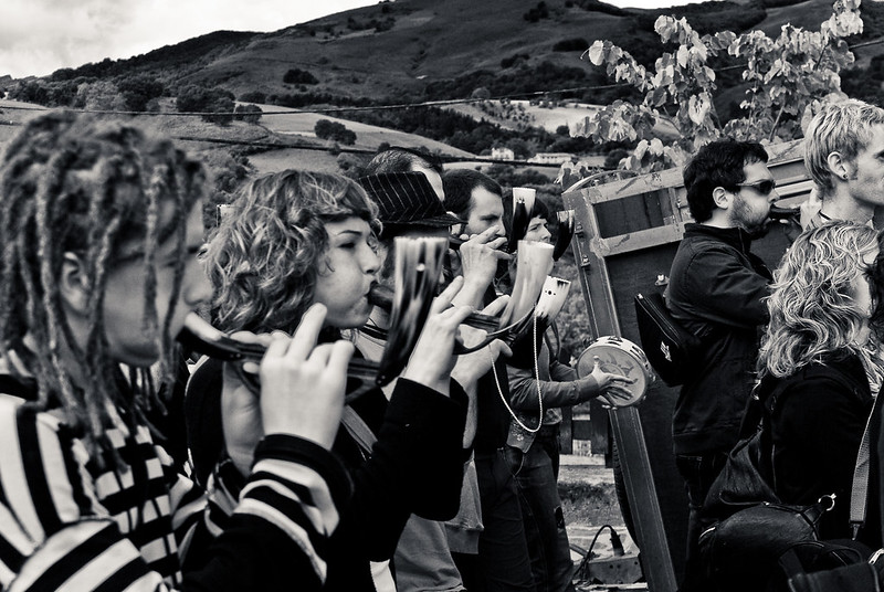 Alboka topaketa (Egilea: Iker Etxebarria Urkaregi)